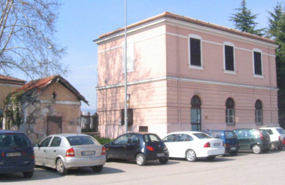 Facciata d'ingresso del fabbricato viaggiatori della stazione di Alatri